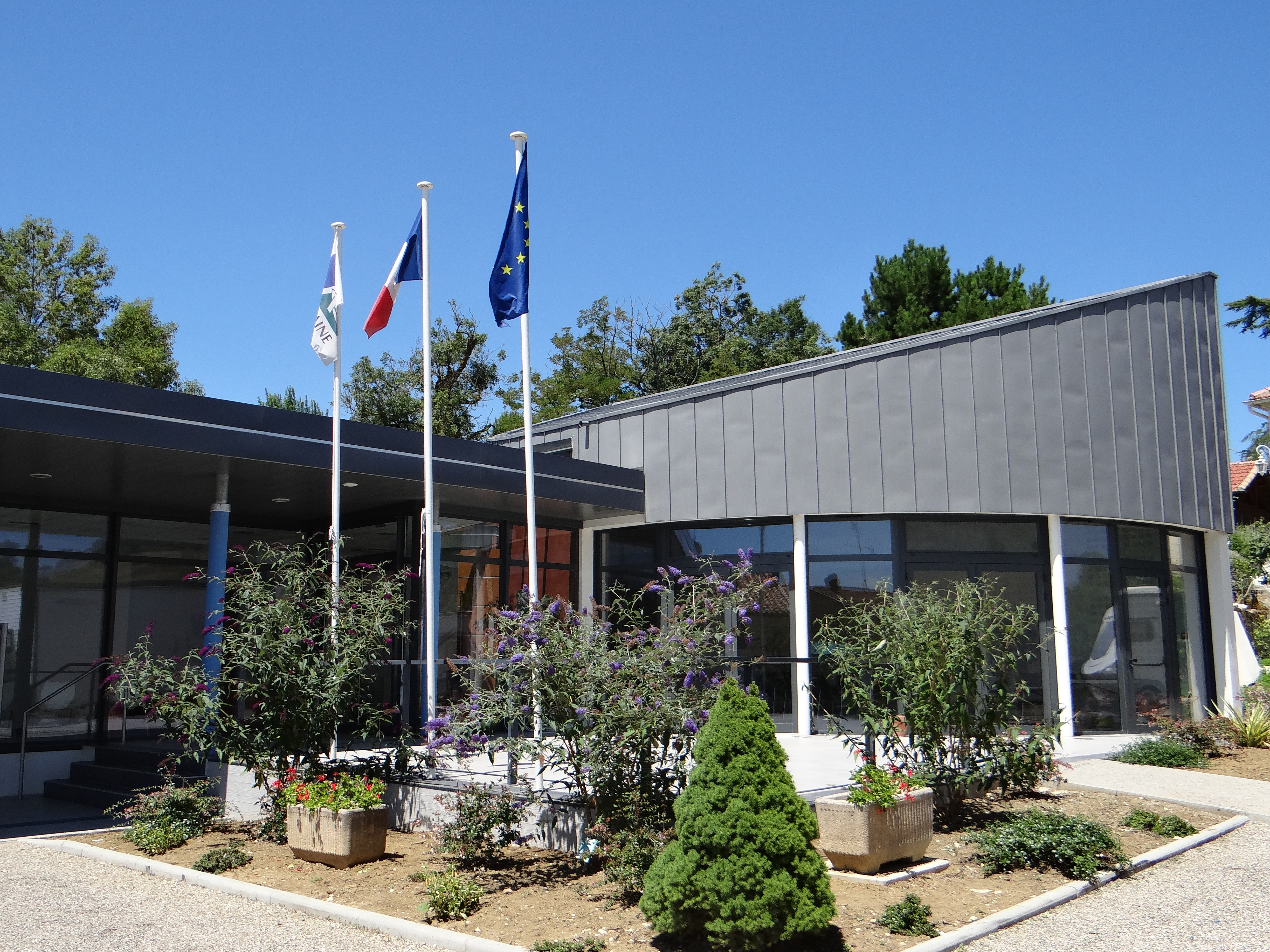 Tayrac - Mairie